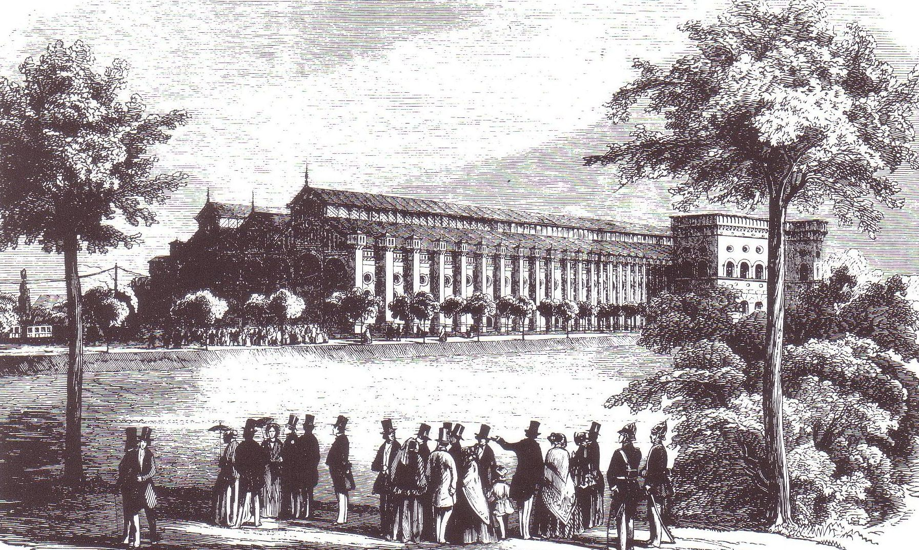 Holzschnitt zur Einweihung des Ostbahngofs in Königsberg i. Pr.